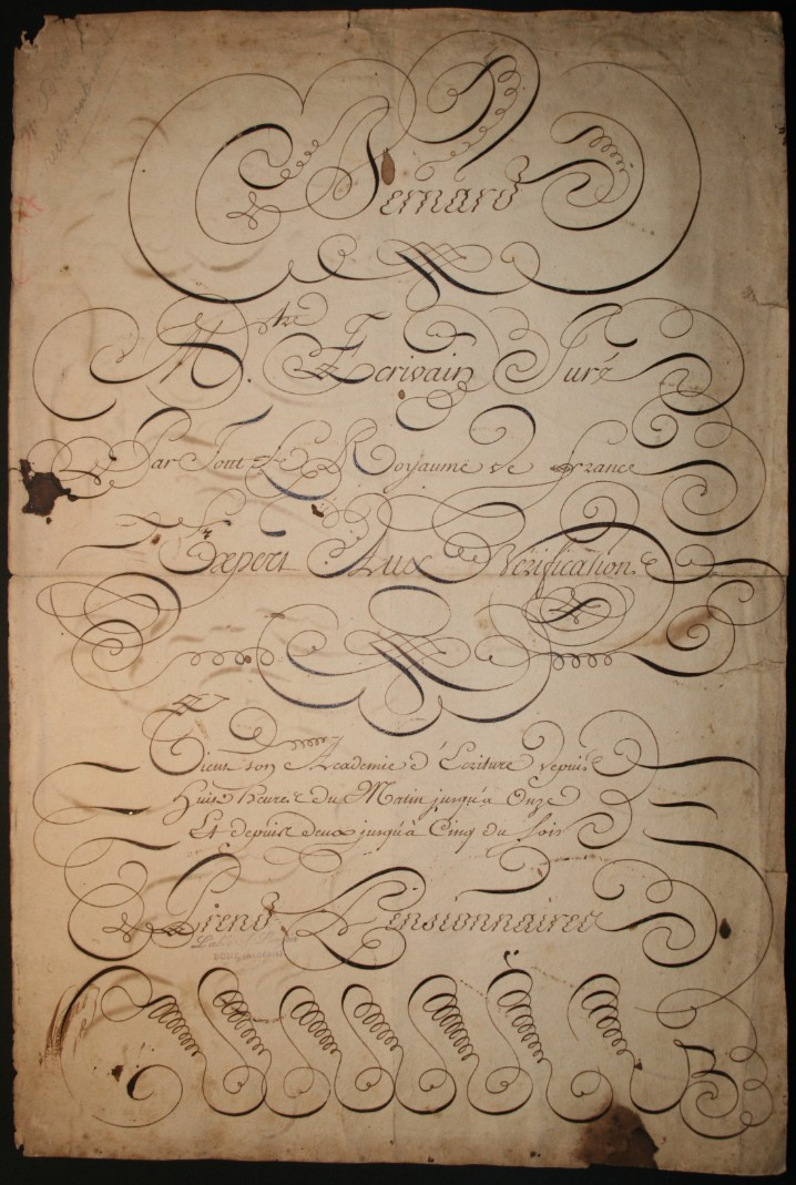 Collection Taupier, c. 1878 : exemple de Bernard de Melun